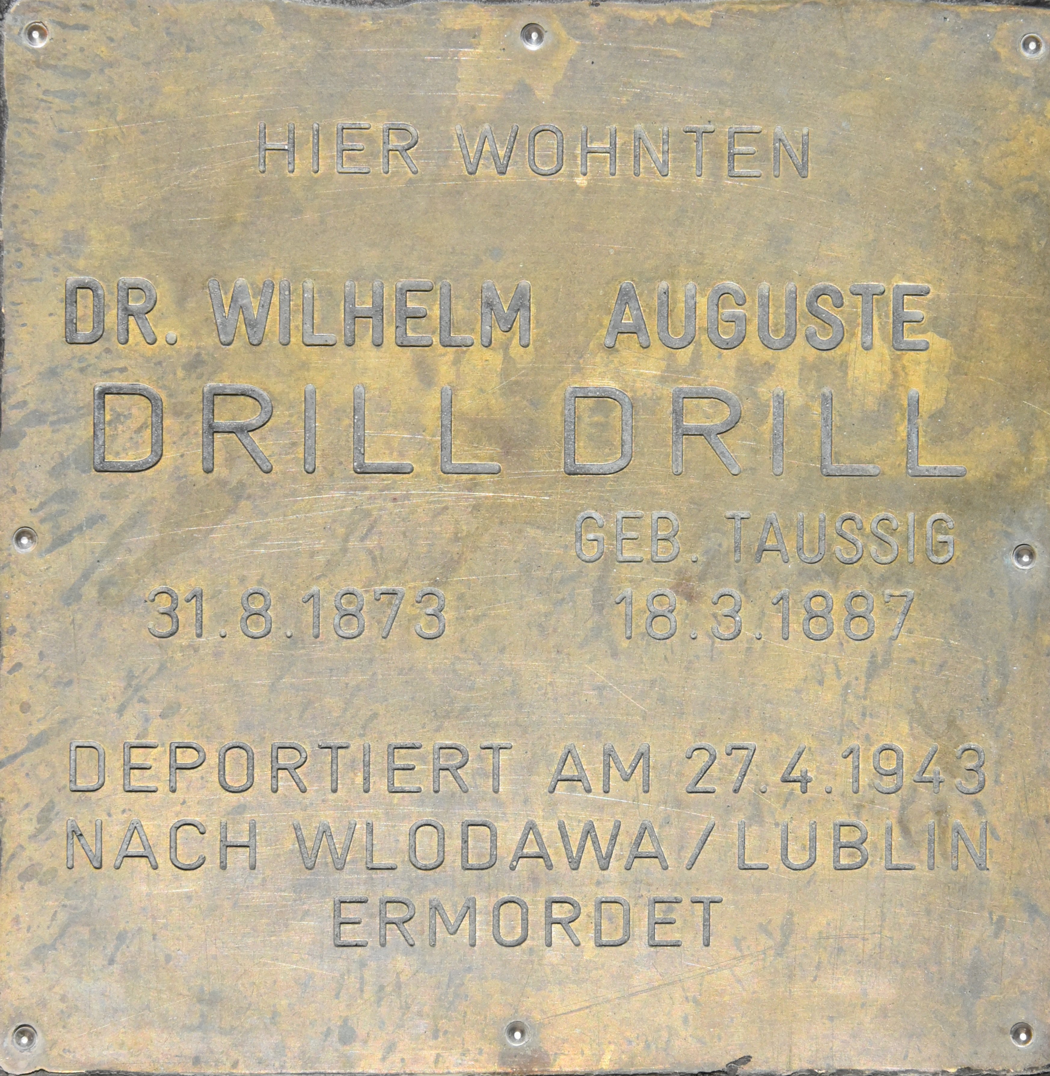 Steine der Erinnerung Wien-Liesing, Auguste und Wilhelm Drill, Maurer Lange Gasse 62, 1230 Wien